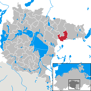 Ankershagen in Mecklenburg-Western Pomerania - District Müritz